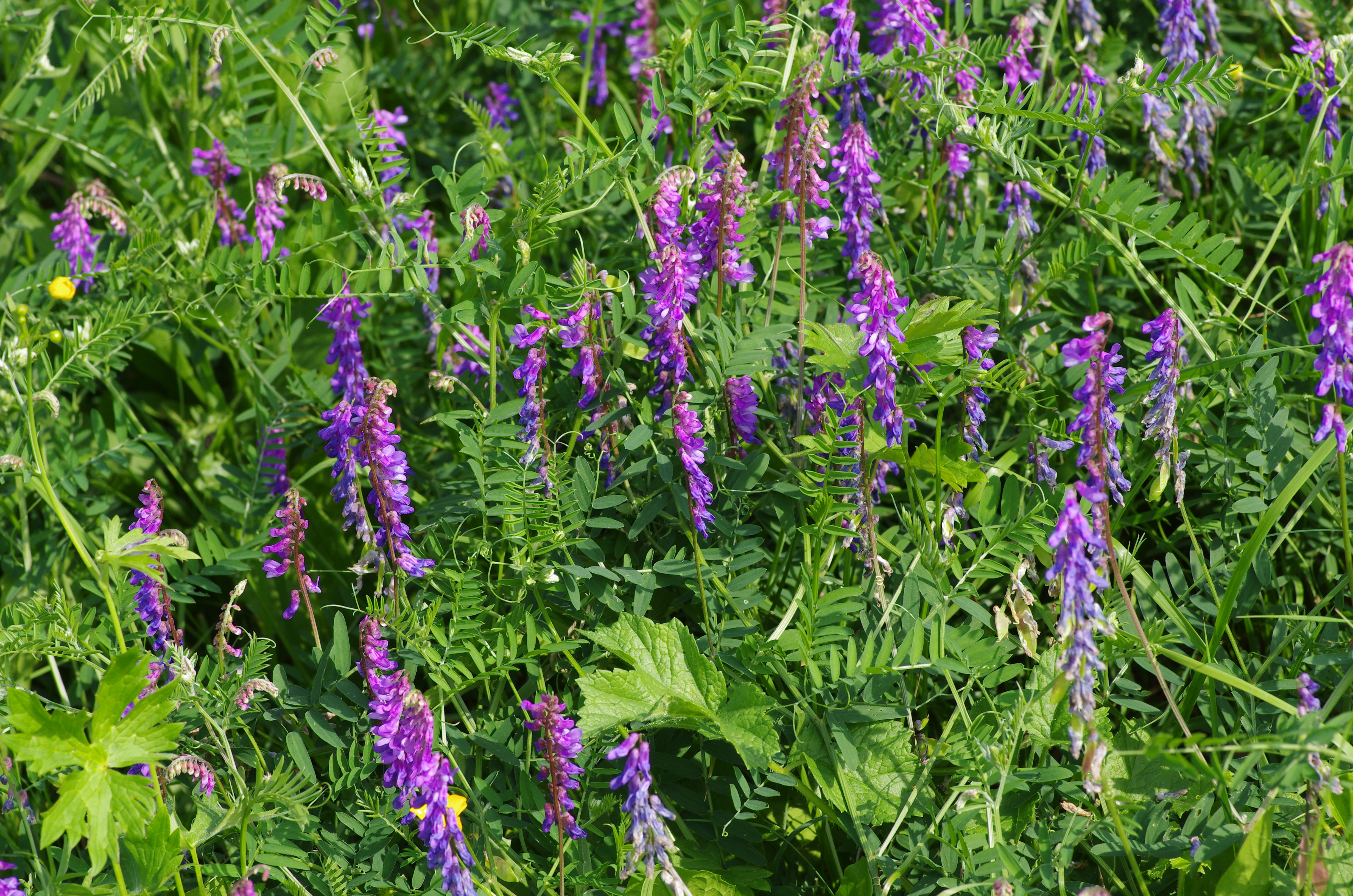 Vicia cracca bei in den Main-Auen bei Bayreuth